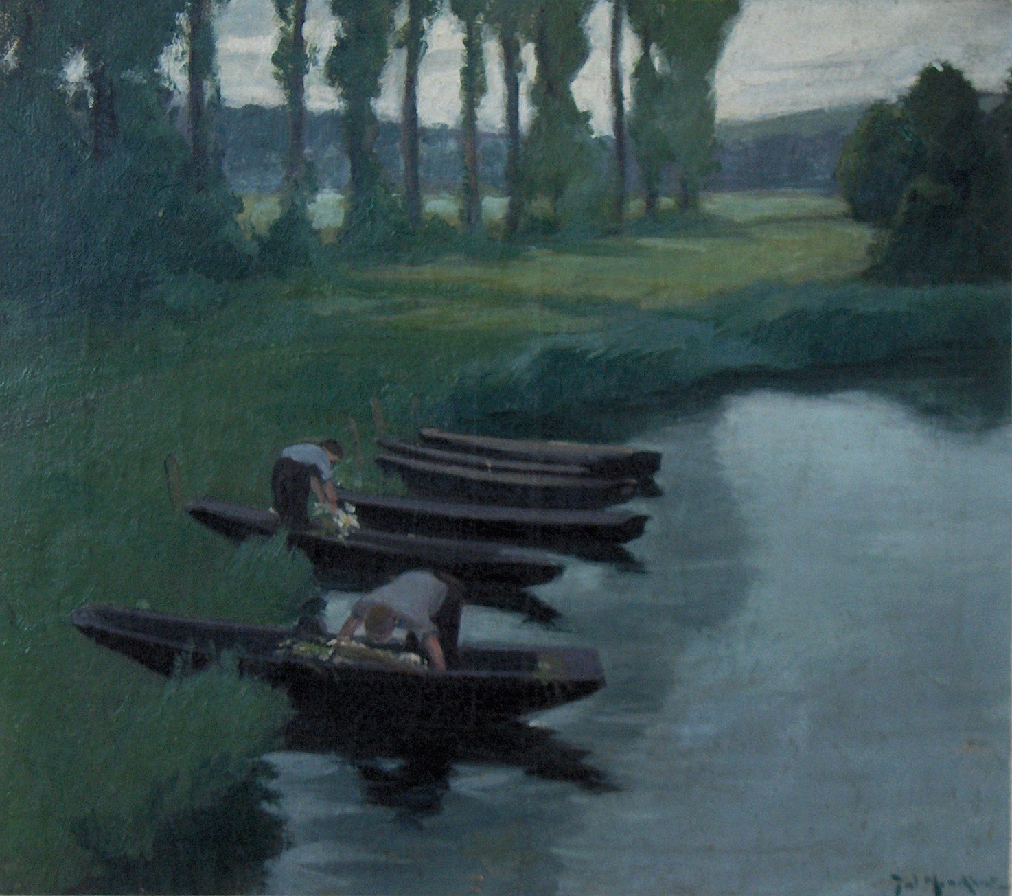 "Oeverzicht met vrouwen in bootjes", olieverf op doek door Jules Merckaert (1872-1924); privé bezit